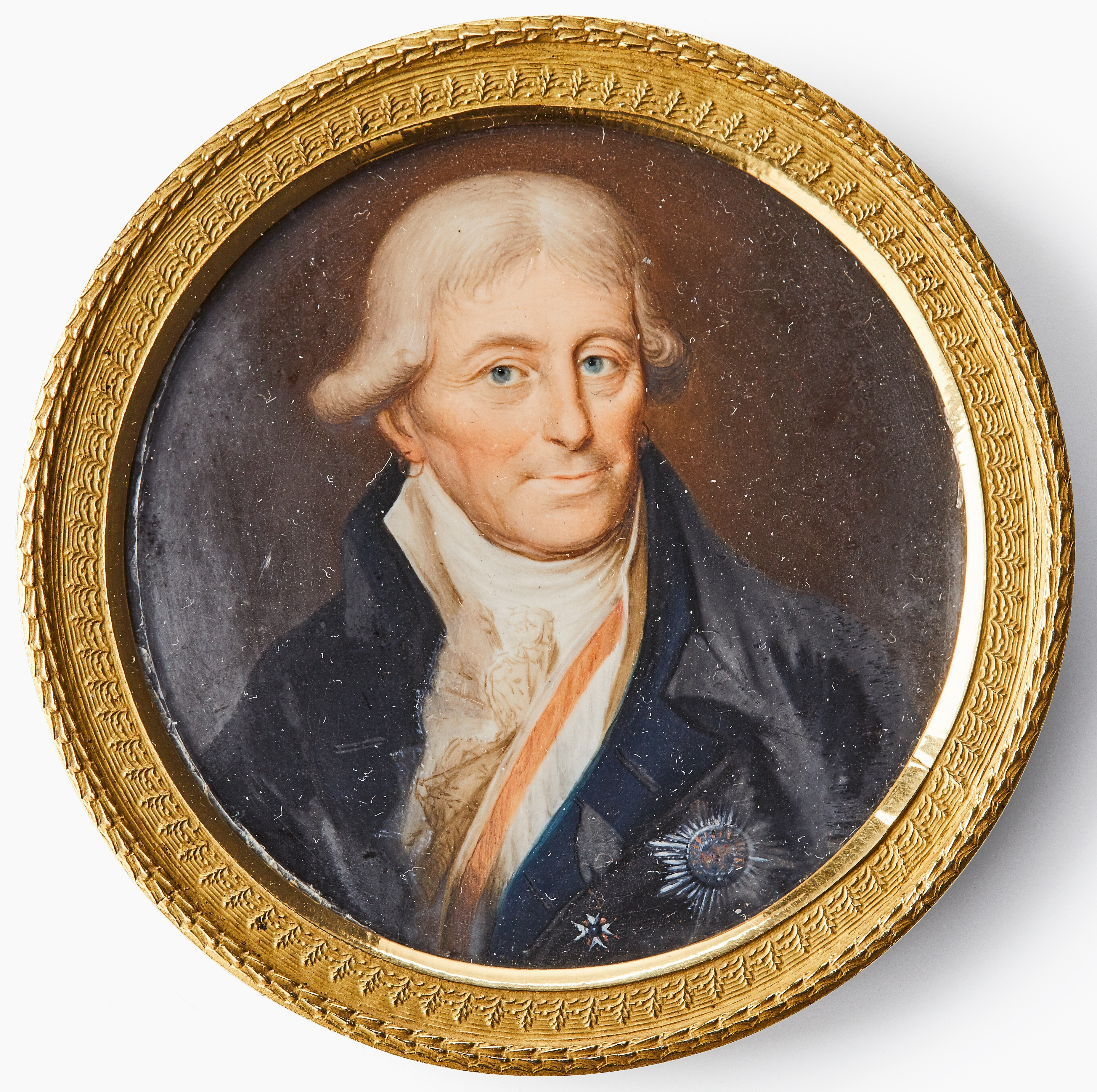 Porträtt av Johan Jacob de Geer af Finspong (1737‑1809), från ca 1800. På bröstet syns riddartecknet av Nordstjärneorden samt kraschan för Preussiska Röda Örns orden. Avporträtterad av Carl Viertel.